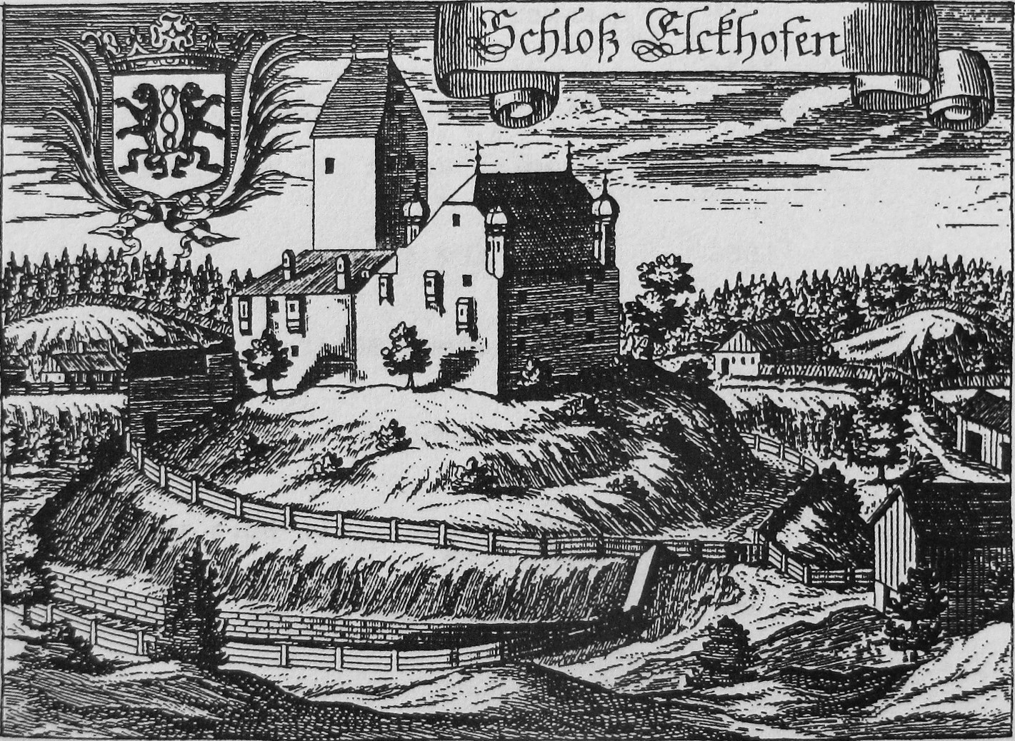 „Schloß Elckhofen“; Kupferstich von Michael Wening